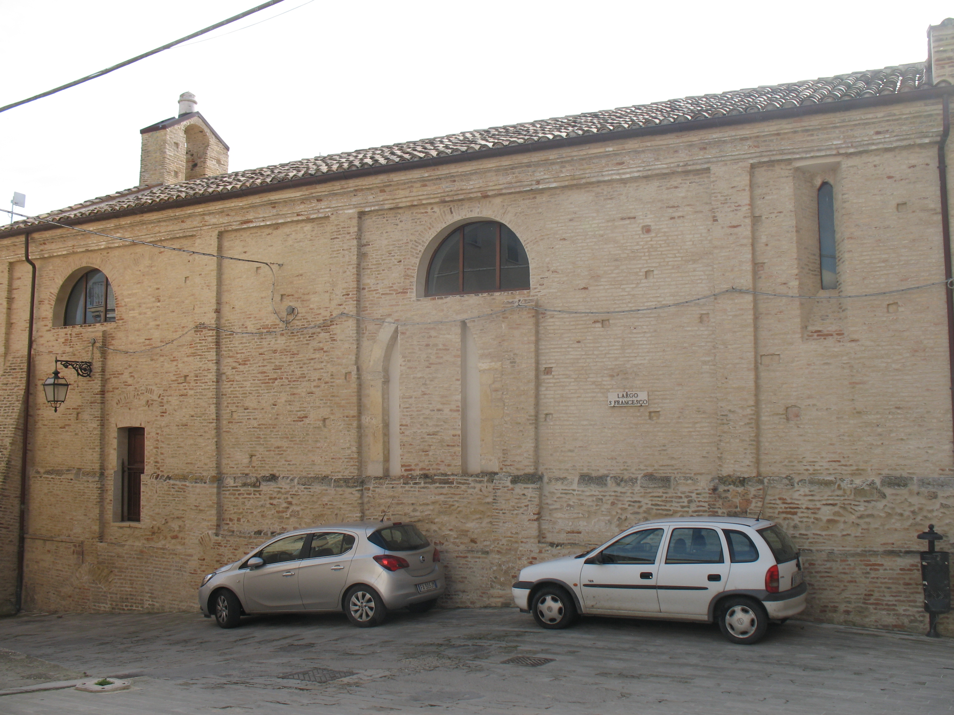 Facciata laterale di origine medievale della sconsacrata chiesa di San Francesco a Villamagna (CH)